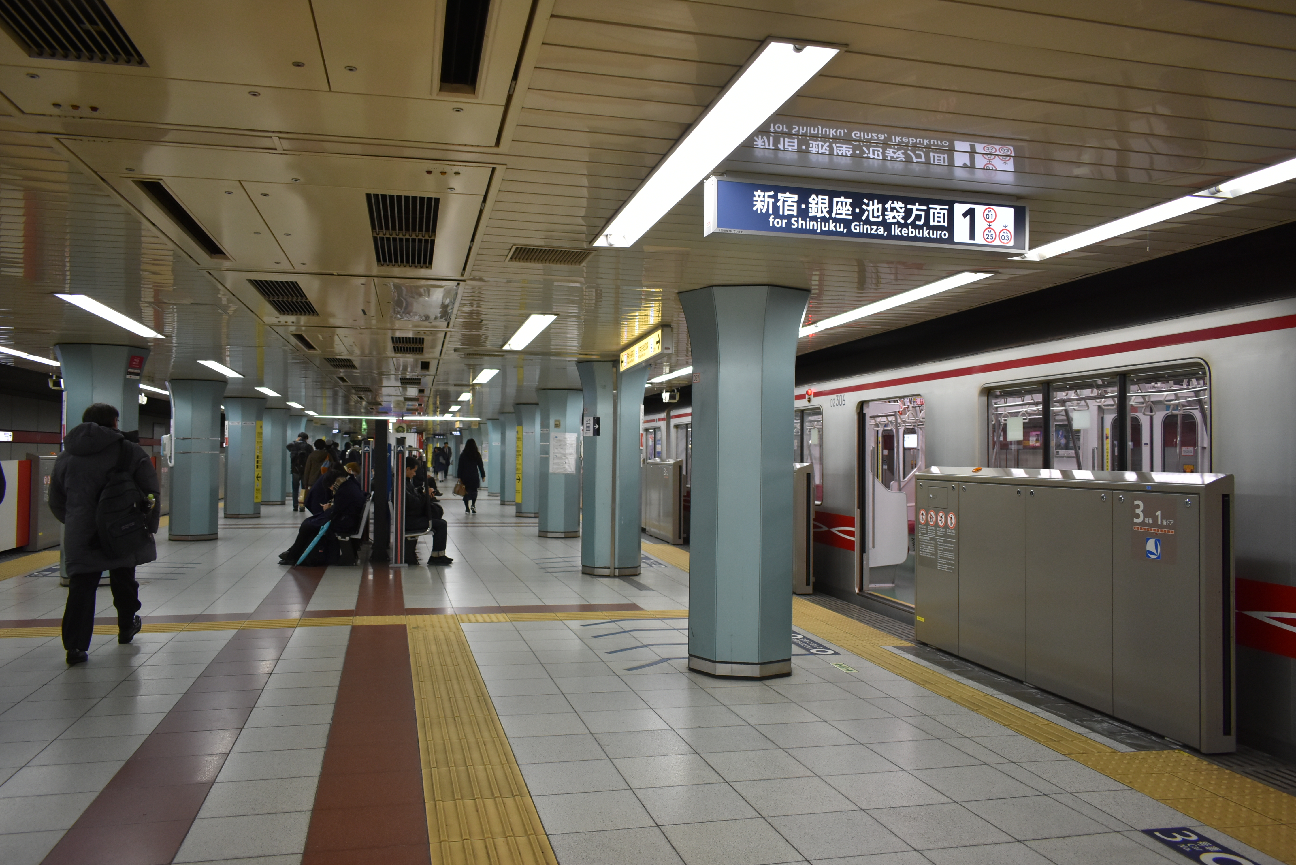 東京メトロ丸の内線 荻窪駅 Nikon D3400